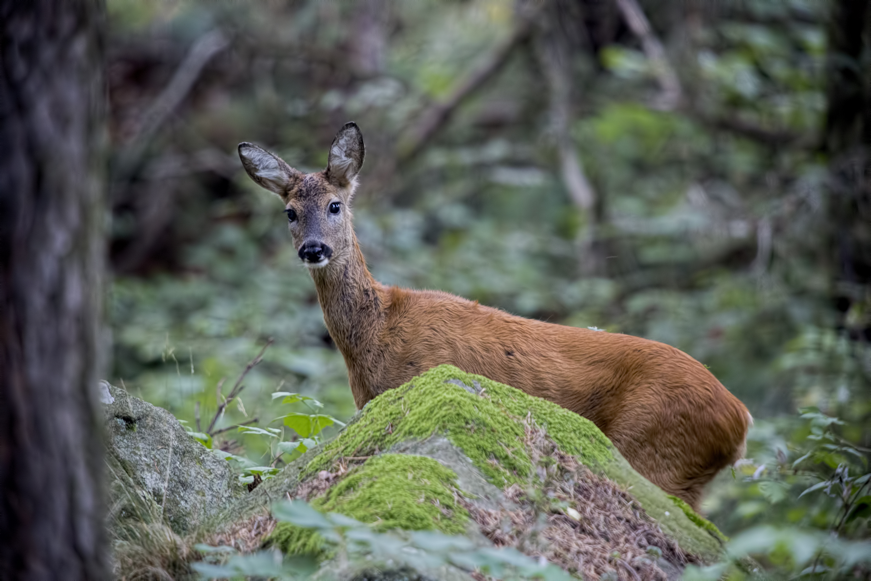 Parco naturale del Colle del Lys (Q3895417)